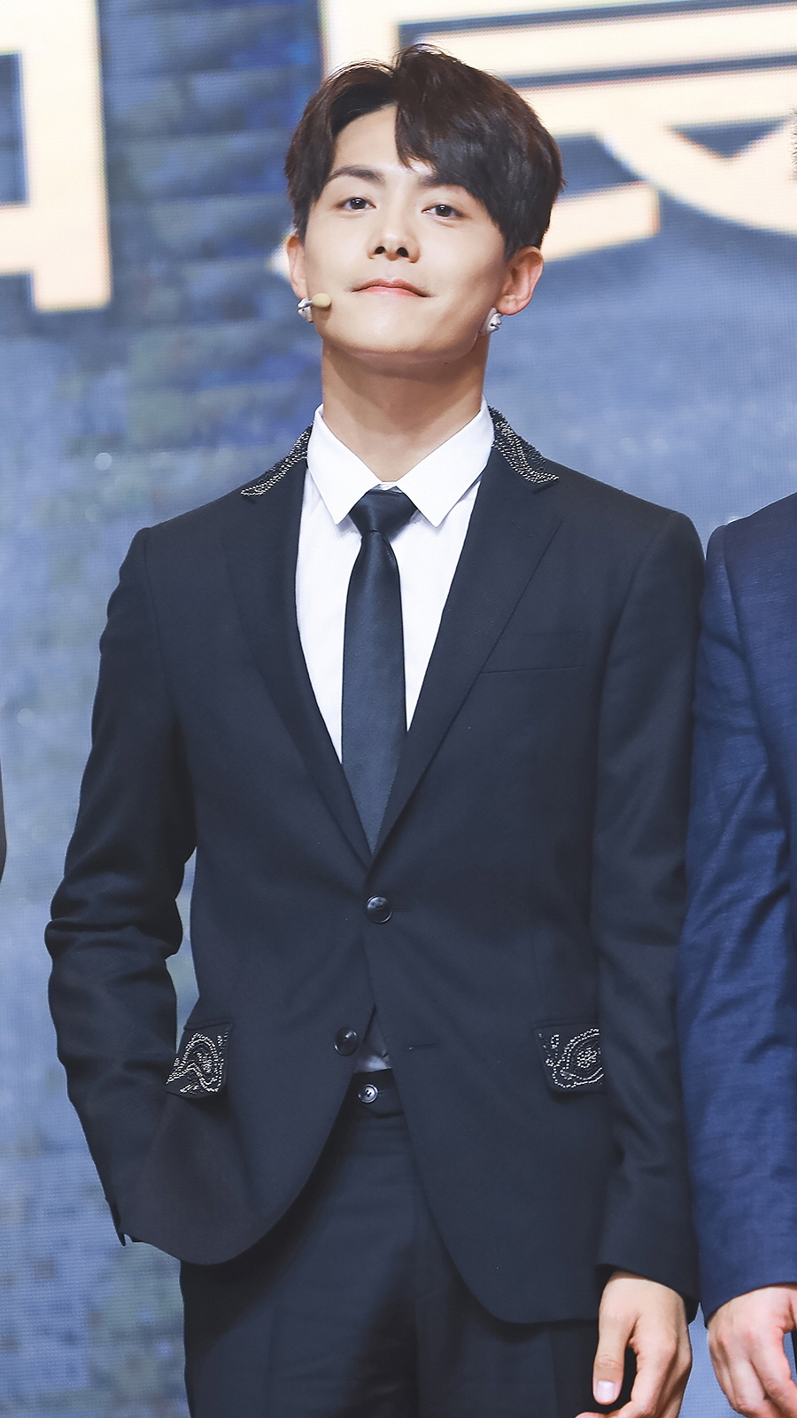 2018-02-03 马天宇 (剑侠世界2)